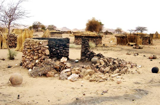 Burnt hut in Darfur